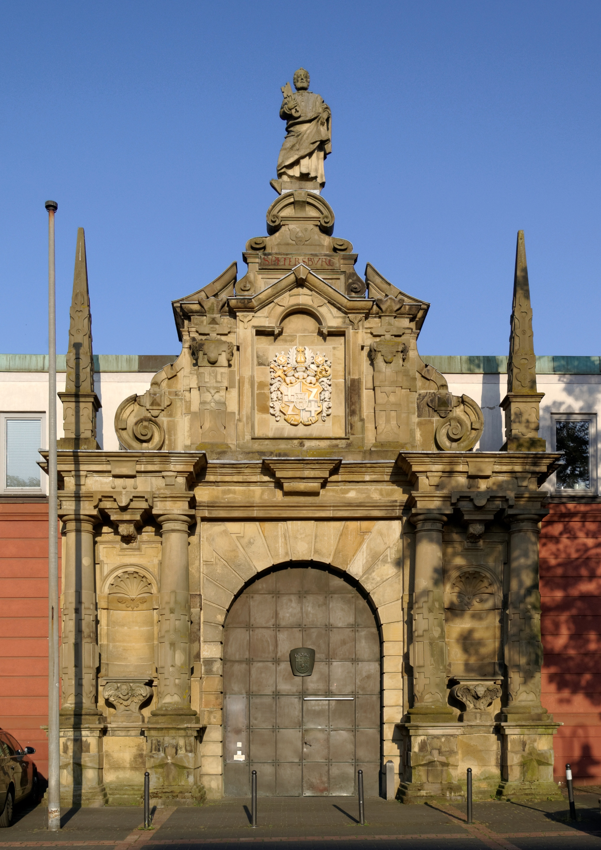 Trier, Denkmalzone ehemaliges kurfürstliches Schloss (Konstantinplatz 6/8, Willy-Brandt-Platz 3): gegen 1648 vollendetes Petersburg-Portal mit überlebensgroßer Petrusskulptur von Bildhauer Hans Rupprecht Hoffmann dem Jüngeren